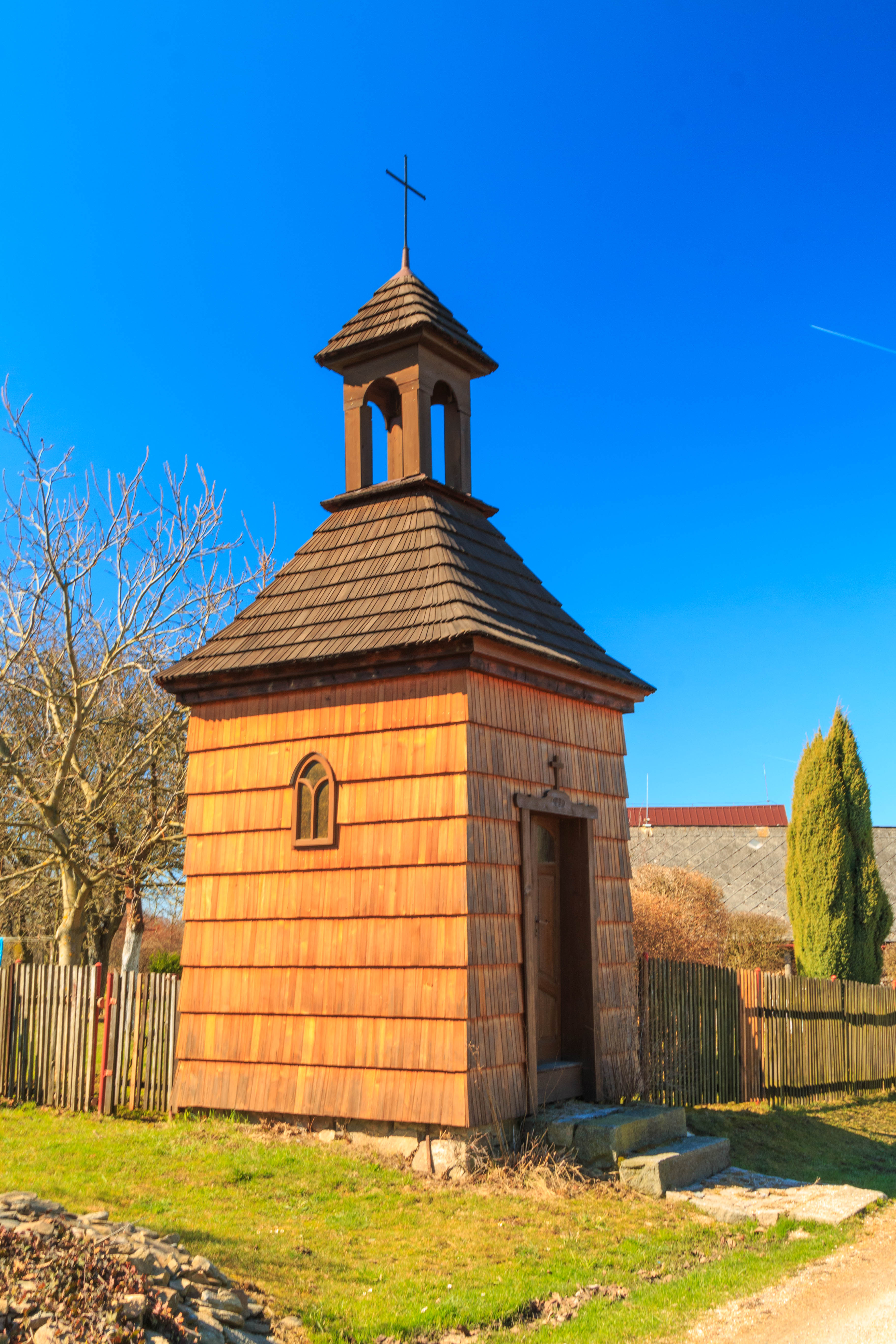 Martinice u Proseče - zvonička